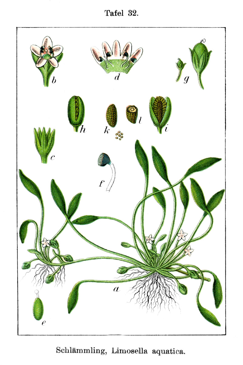 Limosella aquatica L. Original Caption Schlämmling, Limosella aquatica